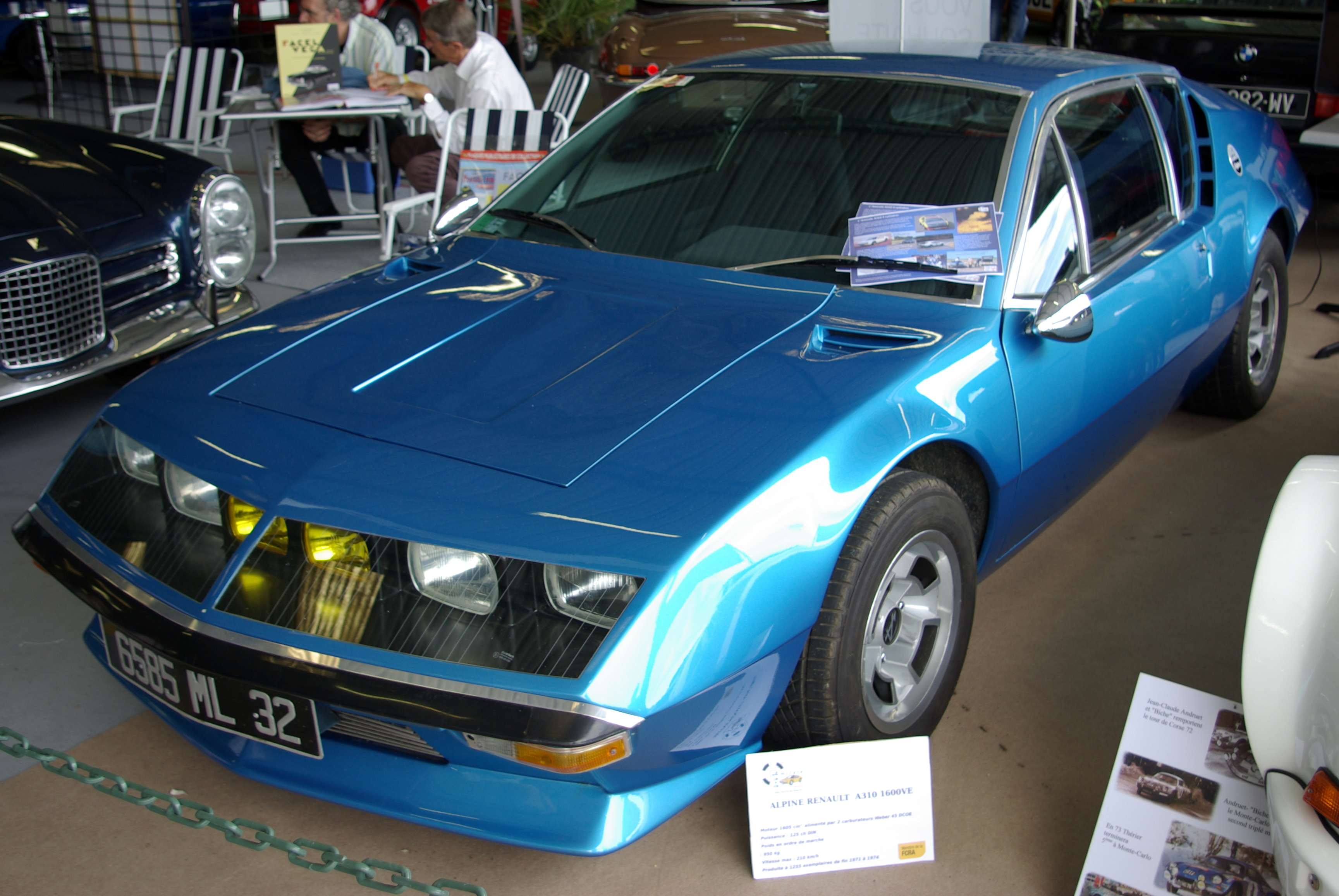 Renault Alpine A310 1600VE